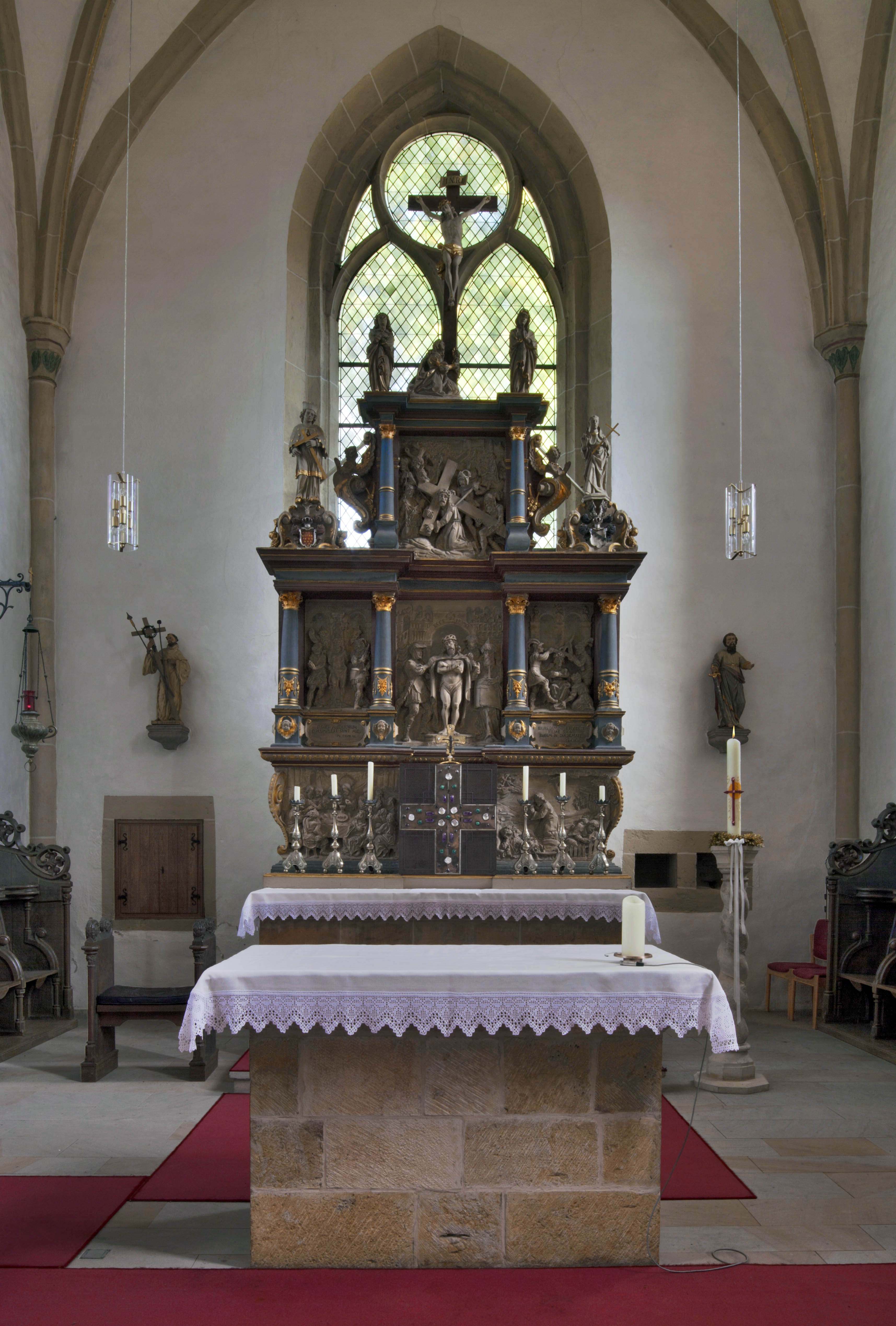 Hochaltar St. Bernhard Kloster Gravenhorst This image shows a heritage building in Germany, located in the North Rhine-Westphalian city Hörstel (no. A 001).